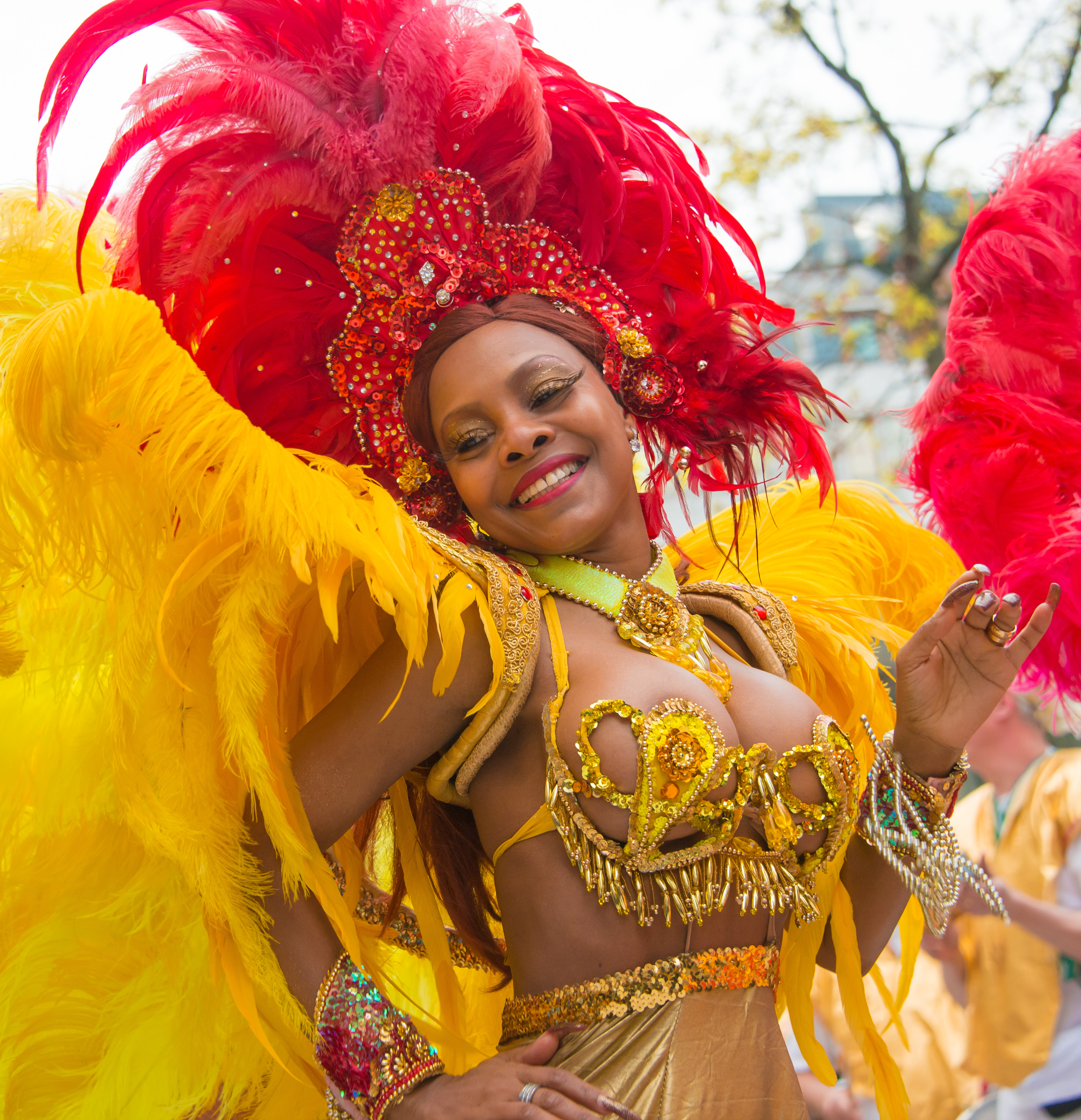 Karnevalståg från Sergels torg under Kulturnatten i Stockholm den 25 april 2015.